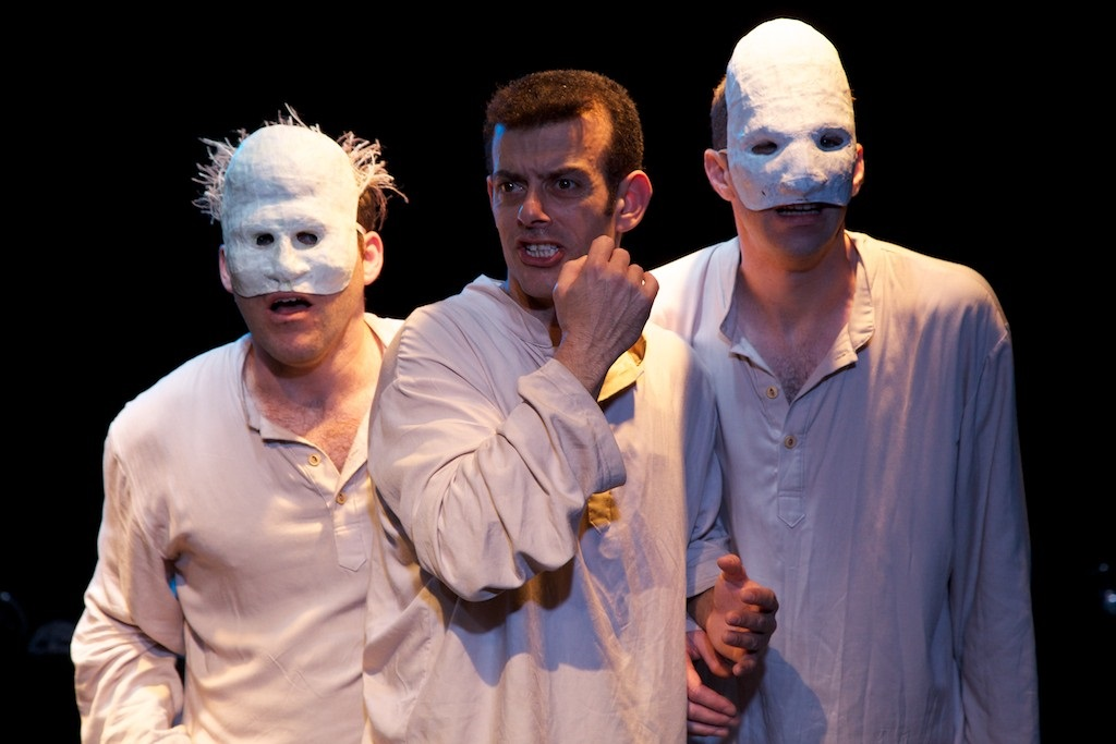 ההצגה "אגף 6", עפ"י אנטון צ'כוב, בבימויו של יפים קוצ'ר, בתיאטרון הסימטה, 2011מימין לשמאל: גיא אלון,אבי עדוי, עירד רובינשטיין